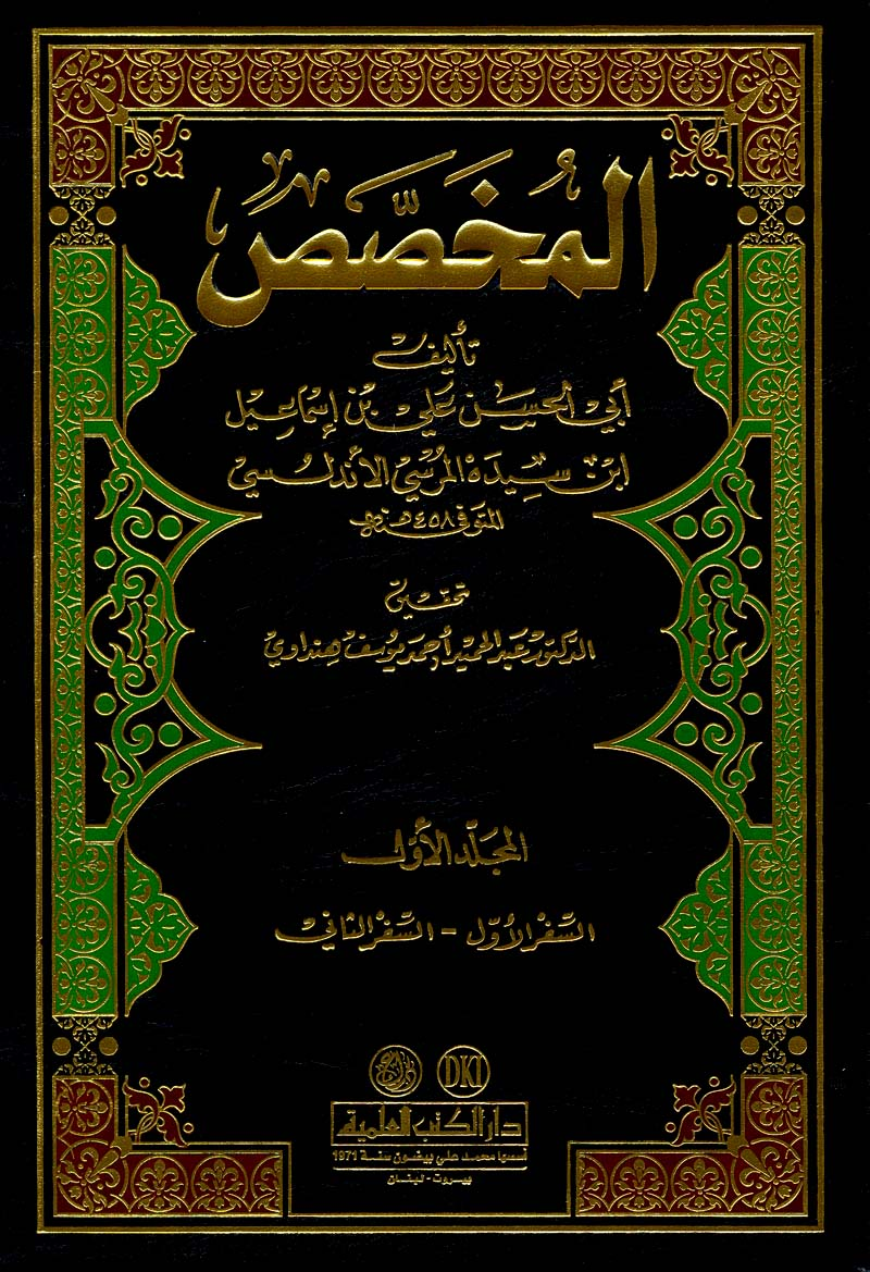 المخصص تأليف ابن سيده، أبو الحسن الأندلسي كتاب في اللغة ومفرداتها ومعانيها واشتقاقات الألفاظ العربية من الأفعال والأسماء وأصولها.